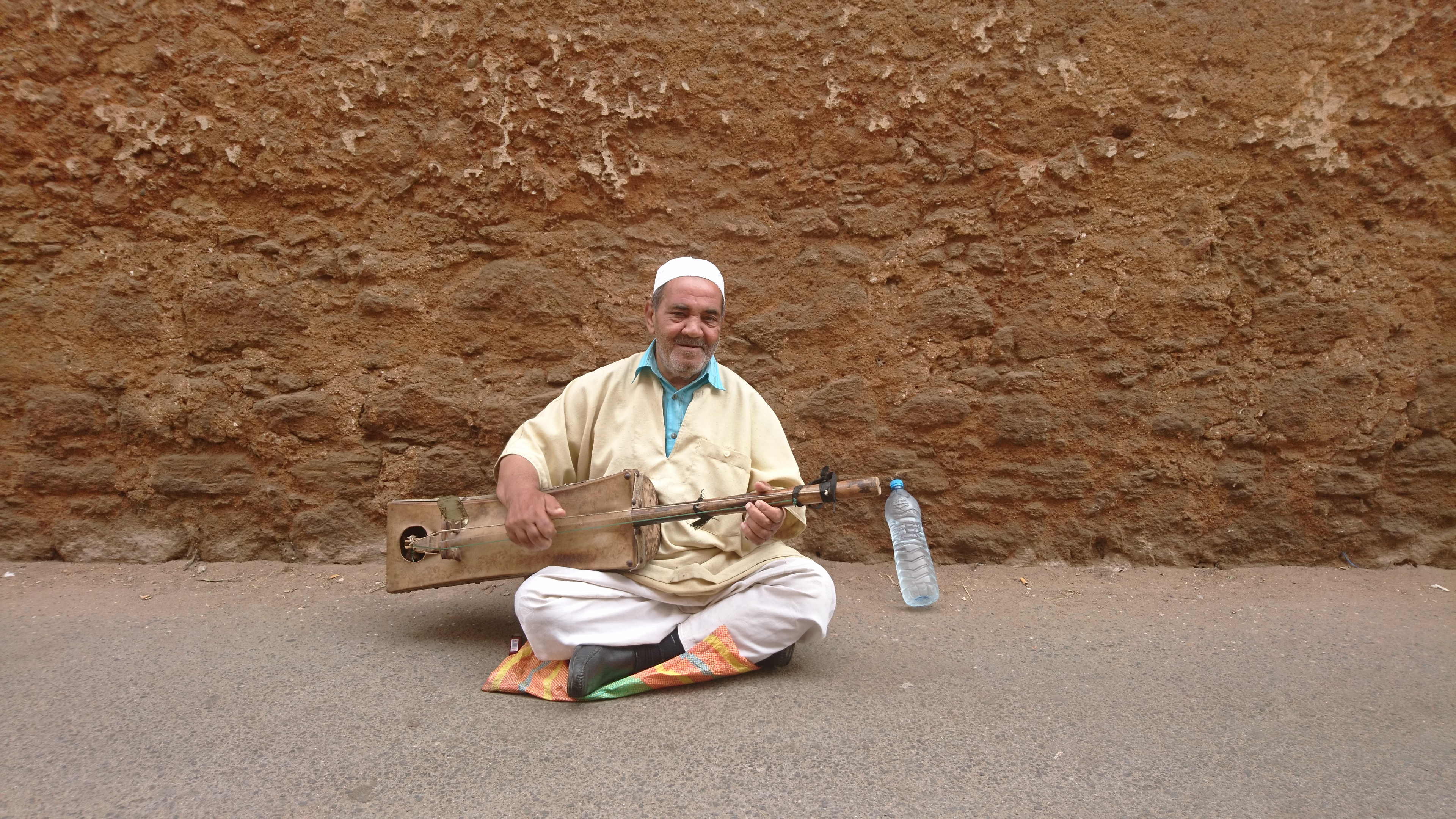 الدارجة: فنان كًناوي تيغني على السور د سلا